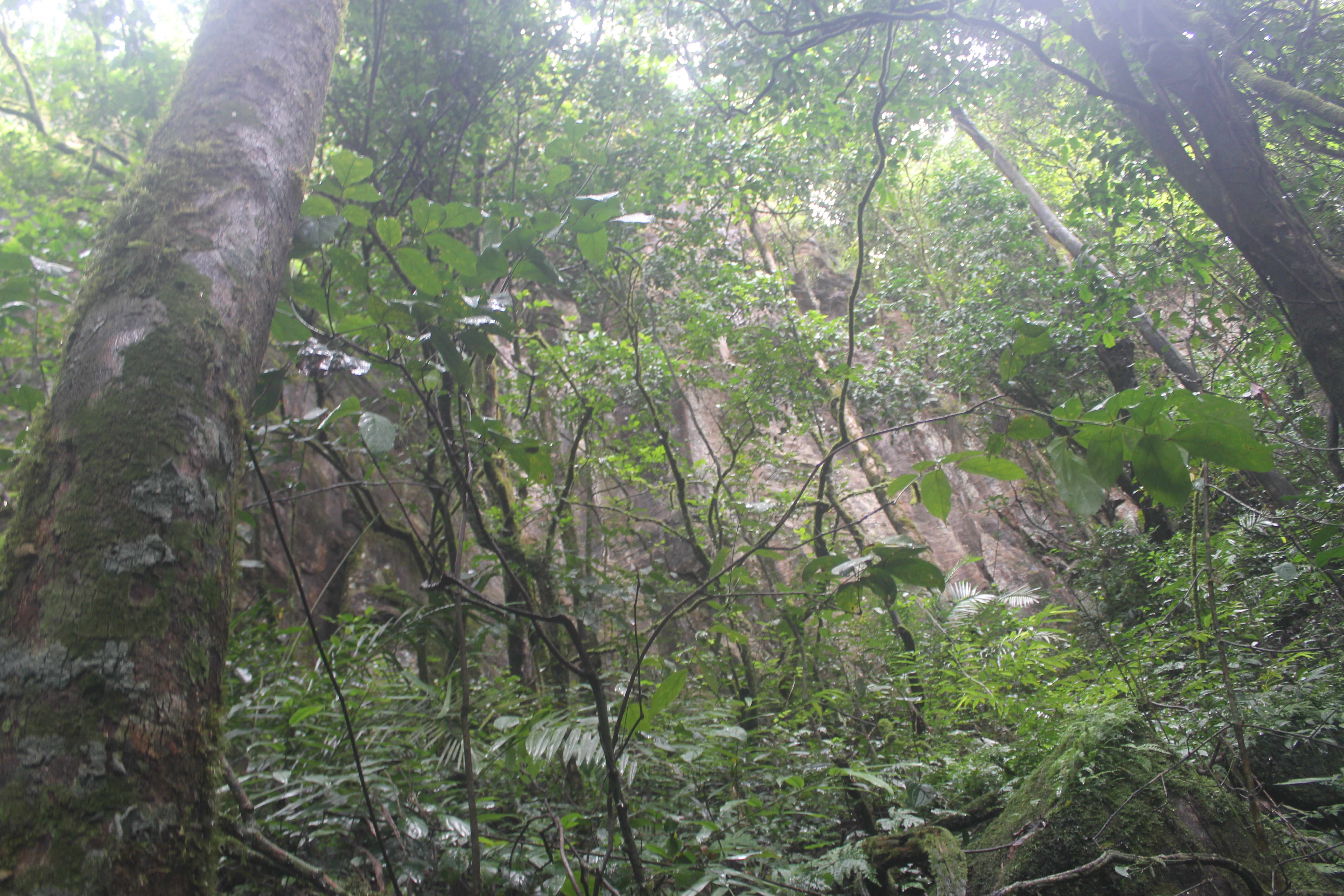 Environs boisés de la chute de Mami Wata située à quelques kilomètres de la ville de Dschang, dans le village de Fongo-Tongo à l'ouest du Cameroun.